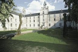 Chavagnes College view